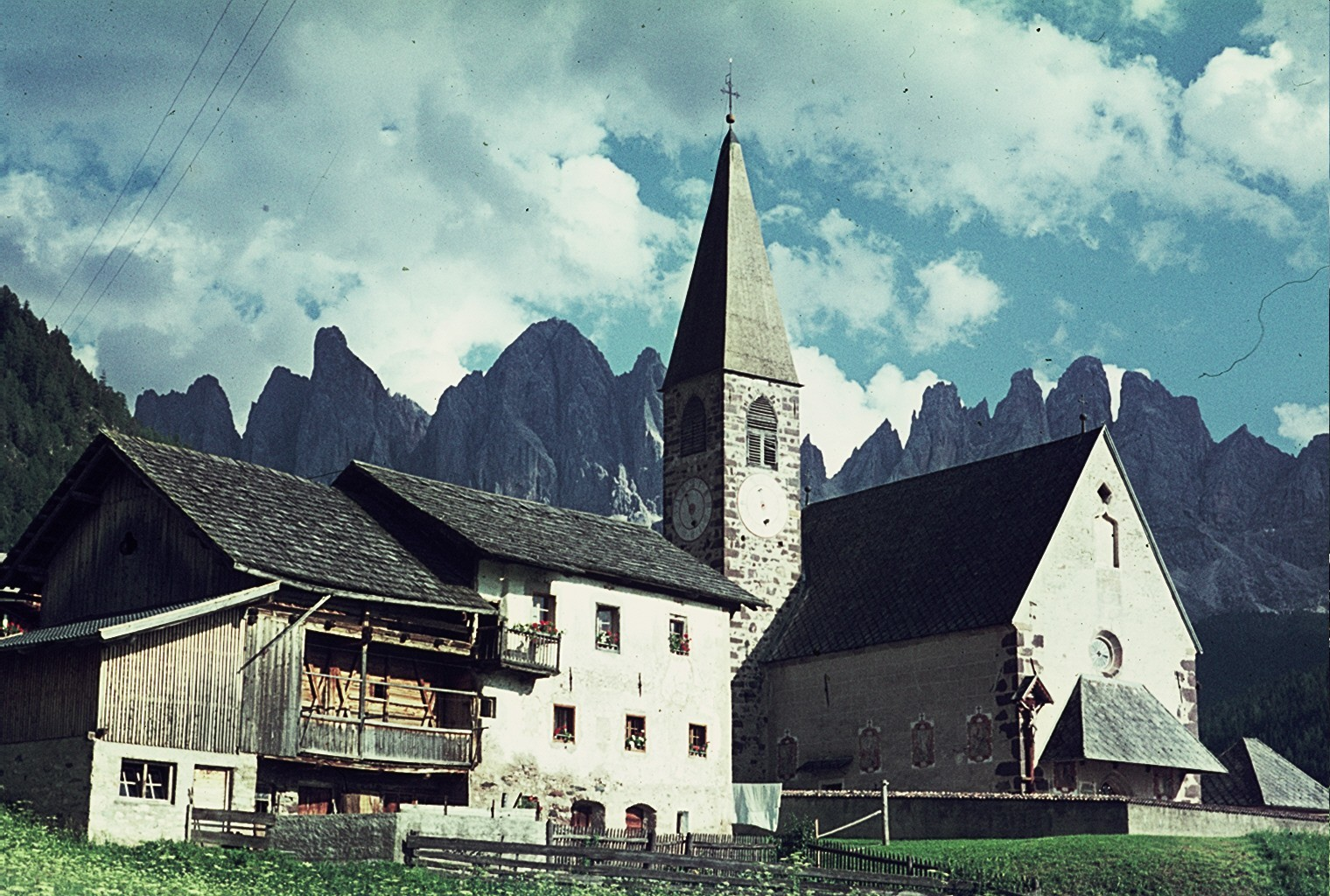 Villnöß, South Tyrol, St. Magdalenen church, 1960s